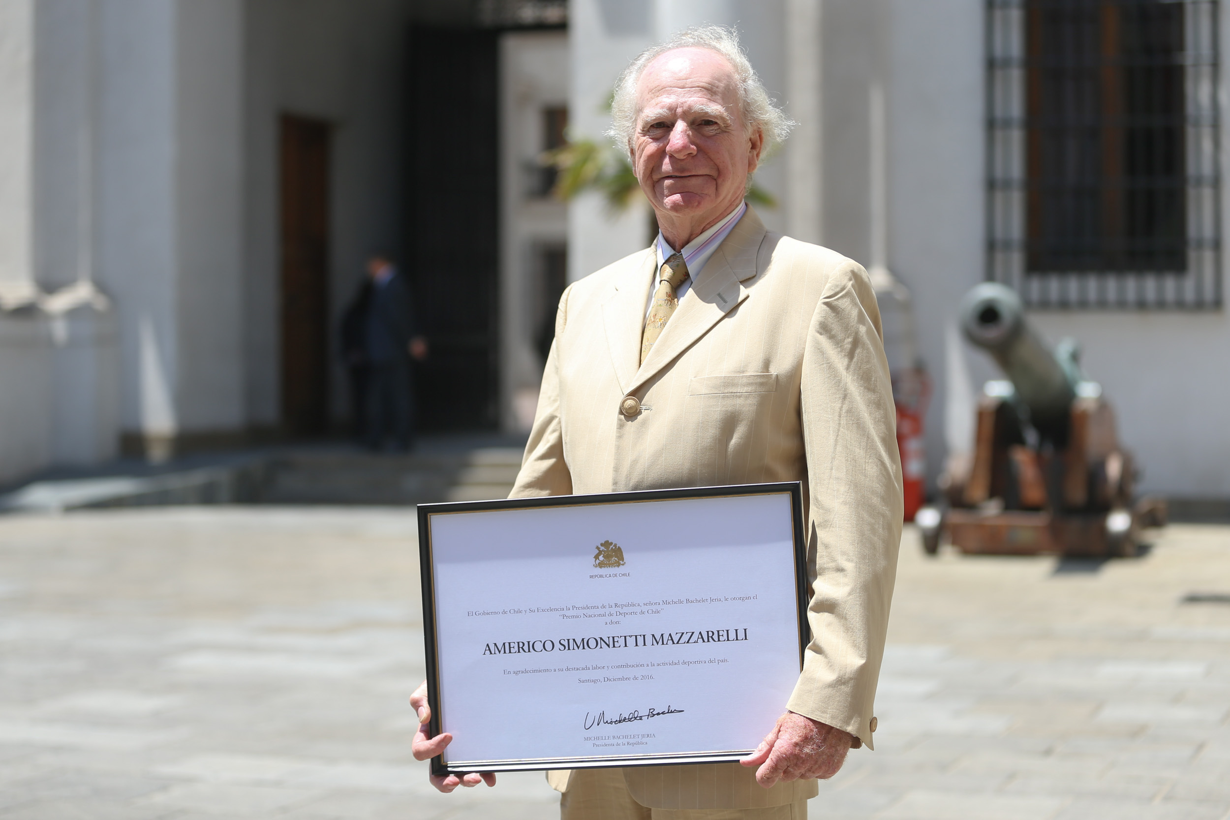 Américo Simonetti tras haber recibido el premio a la treyactoria deportiva en 2016